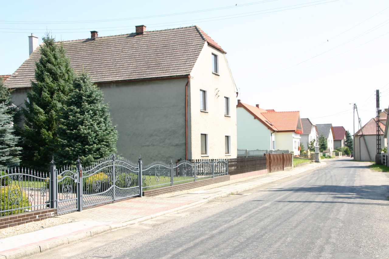 Kromołów (dodatkowa nazwa w j. niem. Kramelau) – wieś w Polsce położona w województwie opolskim, w powiecie krapkowickim, w gminie Walce.